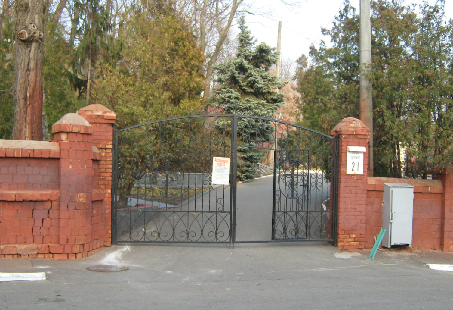 Звіринецьке кладовище